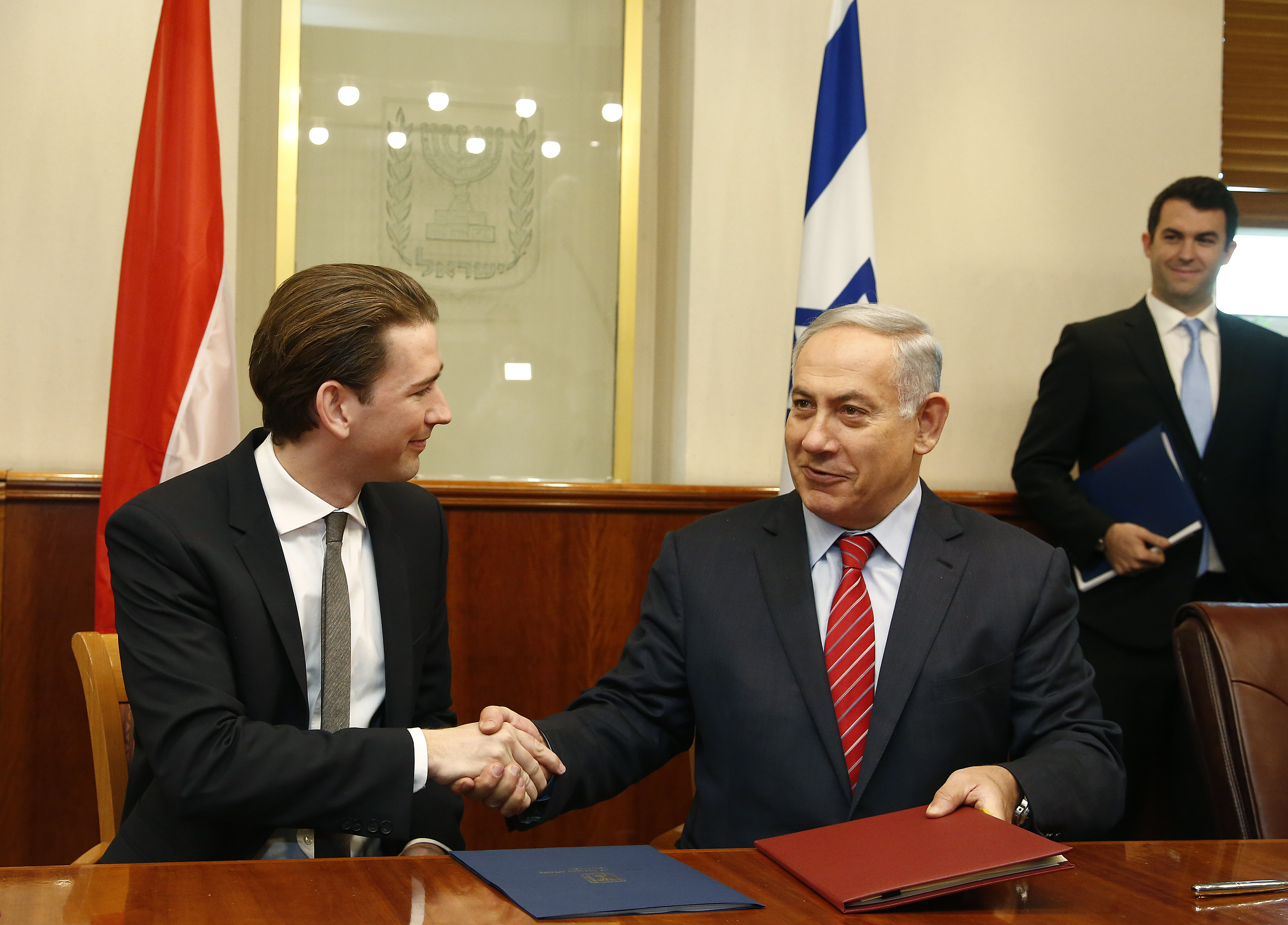 Arbeitsbesuch Israel. Bundesminister Sebastian Kurz trifft Premierminister Benjamin Netanjahu. Jerusalem. 16.05.2015, Foto: Dragan Tatic Sebastian Kurz visit to Israel, May 2016